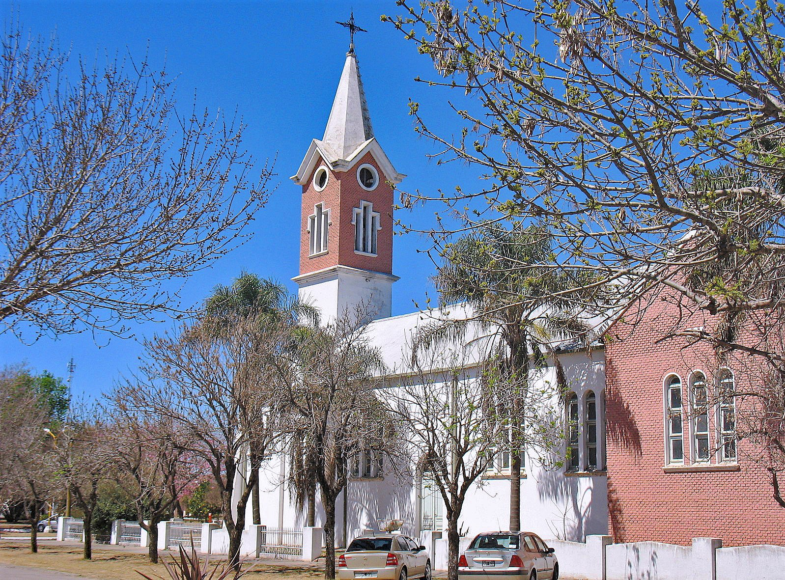 Testimonio descriptivo de un aspecto urbano de Progreso (Santa Fe)